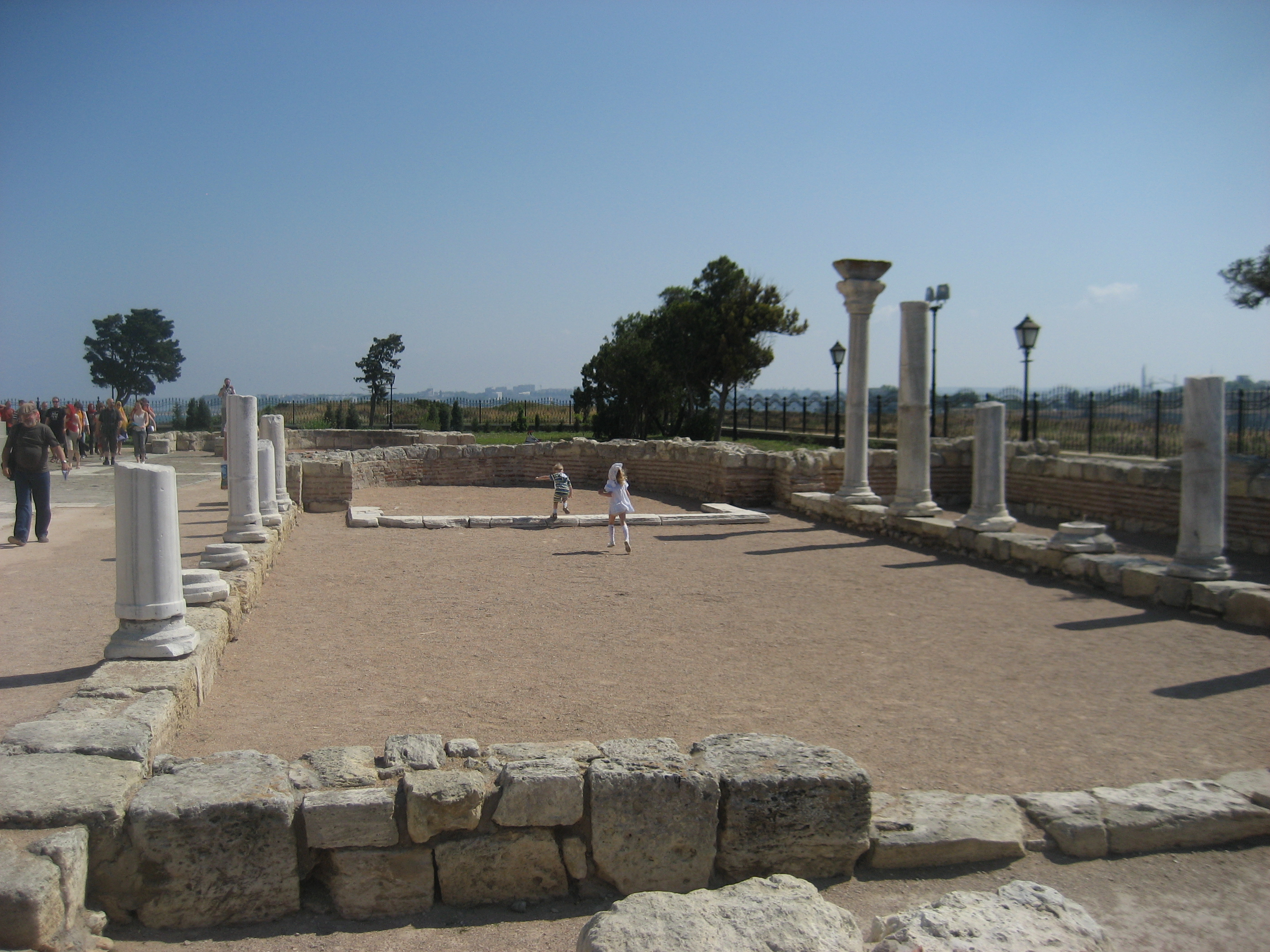 Greckie forum